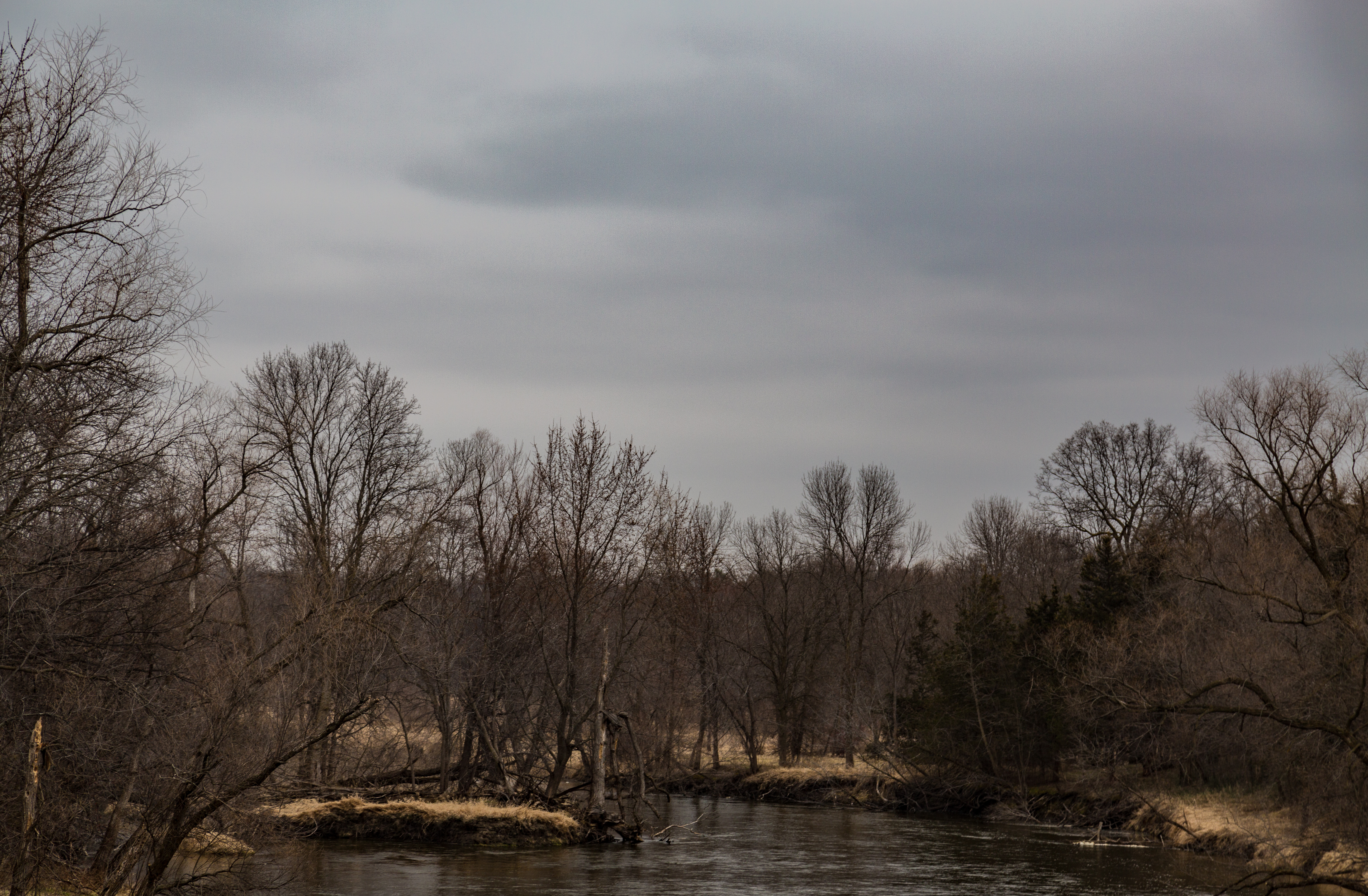 Delano, Minnesota